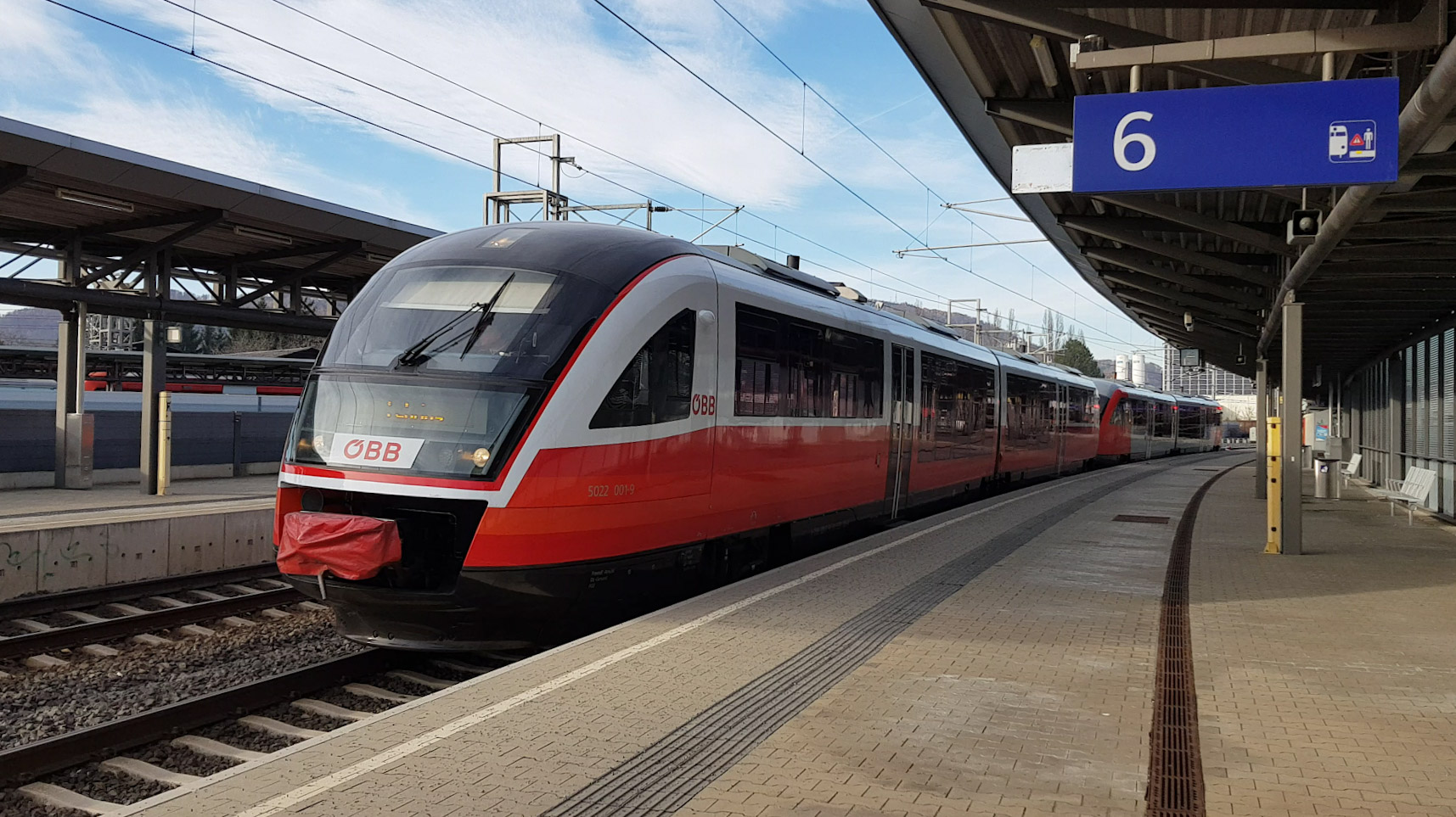 ÖBB 5022 001 im Cityjet-Design